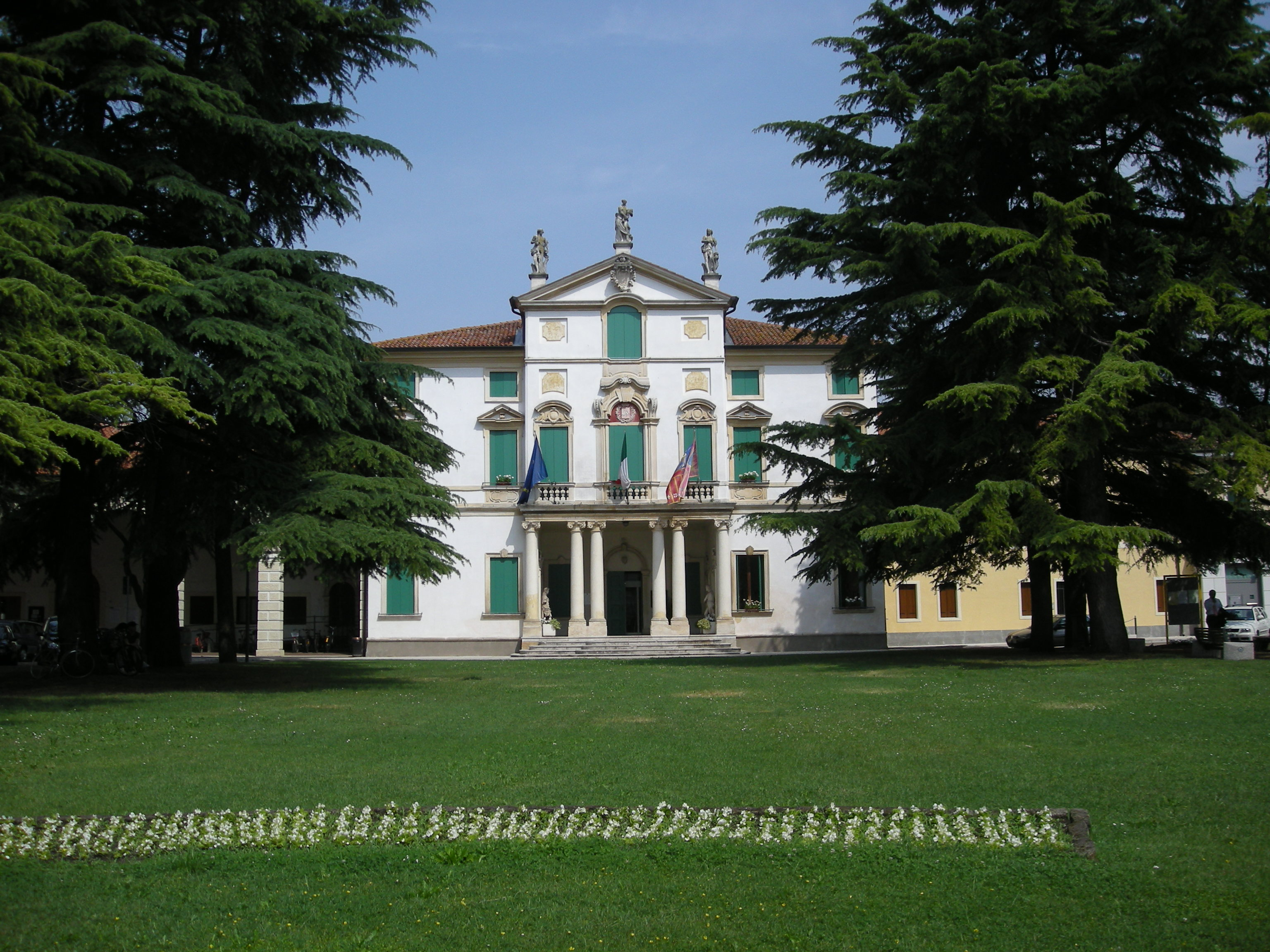 Dueville, Vicenza, Italy, Villa Monza - Municipio. Attributed to Francesco Muttoni, 1715